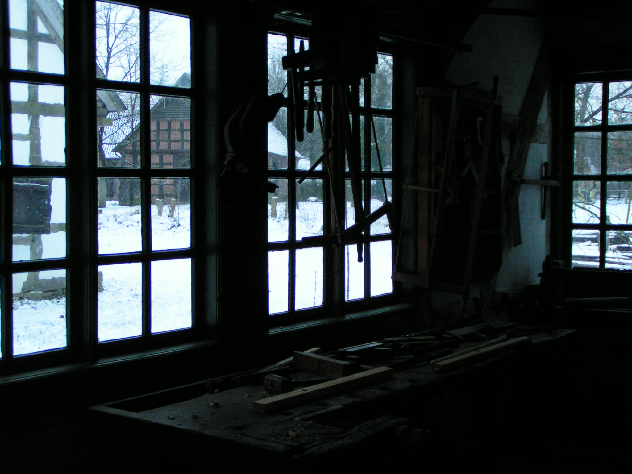 Museumsdorf Cloppenburg - Blick aus der Zimmermannswerkstatt